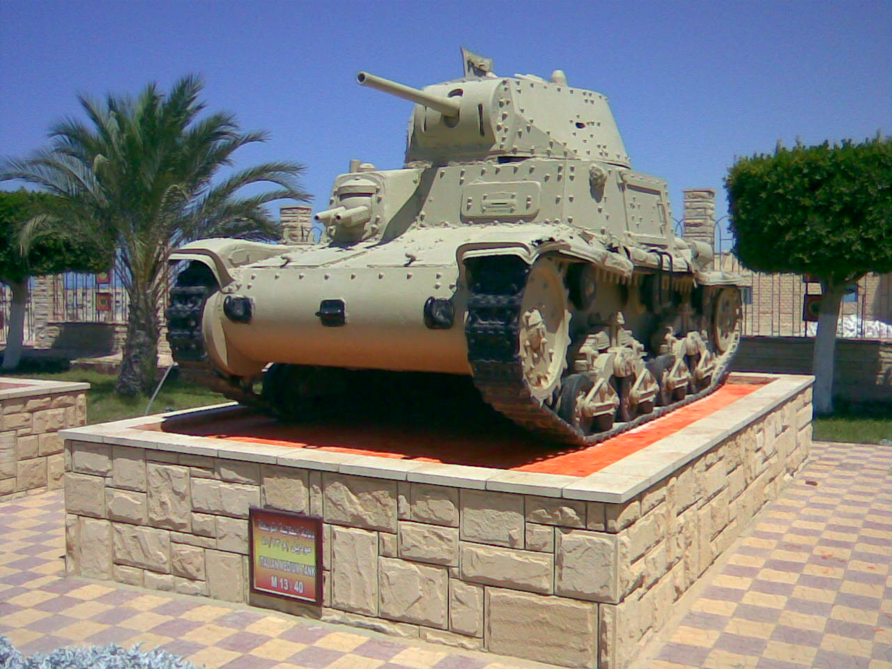 Carro armato italiano M13/40 usato in nordafrica durante la seconda guerra mondiale ed esposto al museo della Battaglia di El Alamein (Egitto)